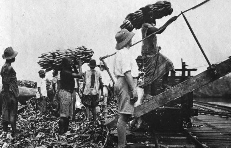 Kamerun, Verladen von Bananen an der Landungsbrücke der Afrikanischen Fruchtkompagnie bei Tiko Unter den Ausfuhrerzeugnissen unserer ehemaligen Kolonie Kamerun steht heute die Banane an erster Stelle. Deutsche Pflanzungsgesellschaften, voran die Afrikanische Fruchtkompagnie Hamburg, sind es, die diese Früchte unter Leitung deutscher Beamter anpflanzen und ernten. Deutsche Dampfer mit grossen Kühlanlagen führen sie nach Deutschland dem Verbraucher zu.